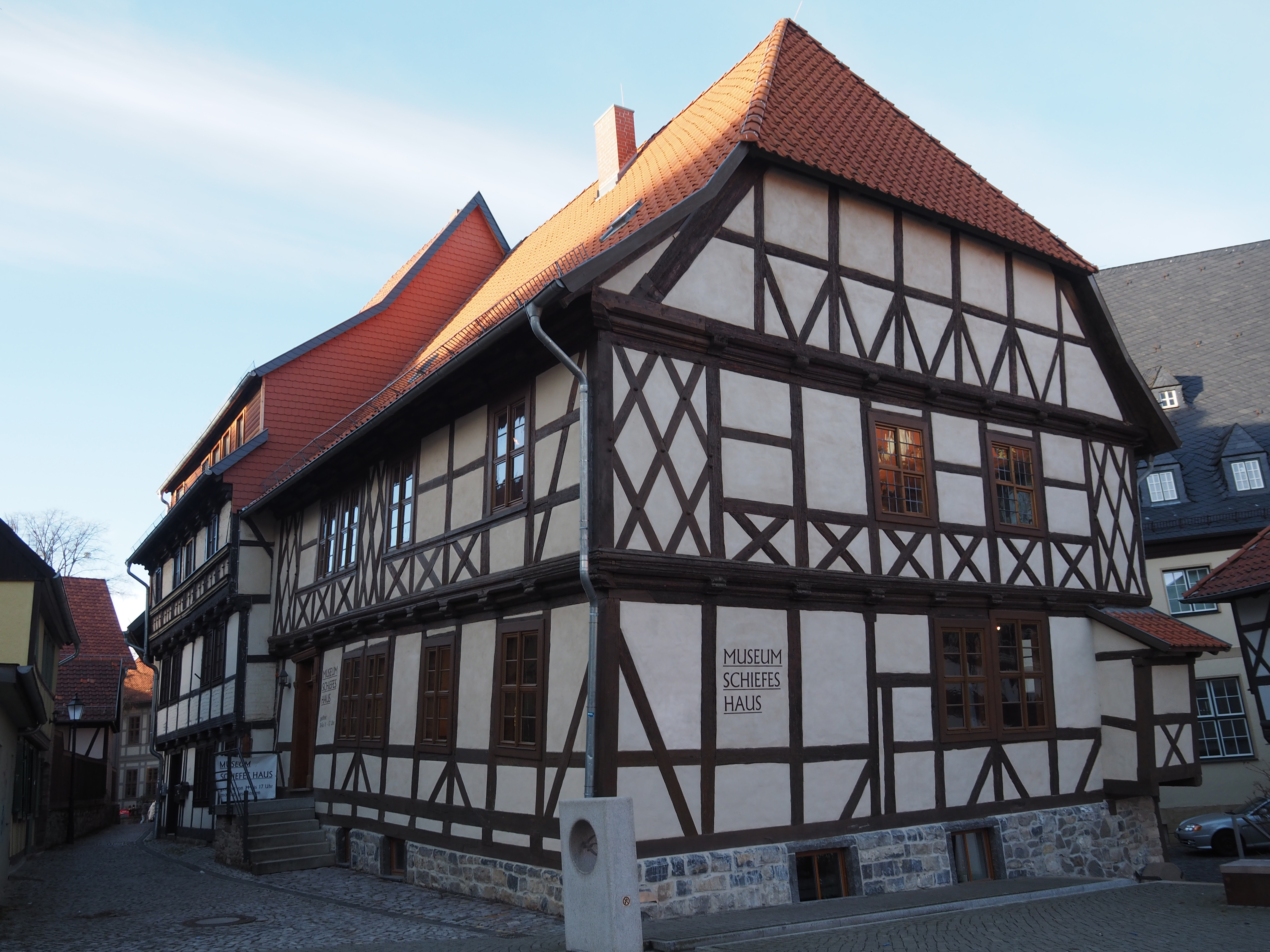 Museum Schiefes Haus, Wernigerode